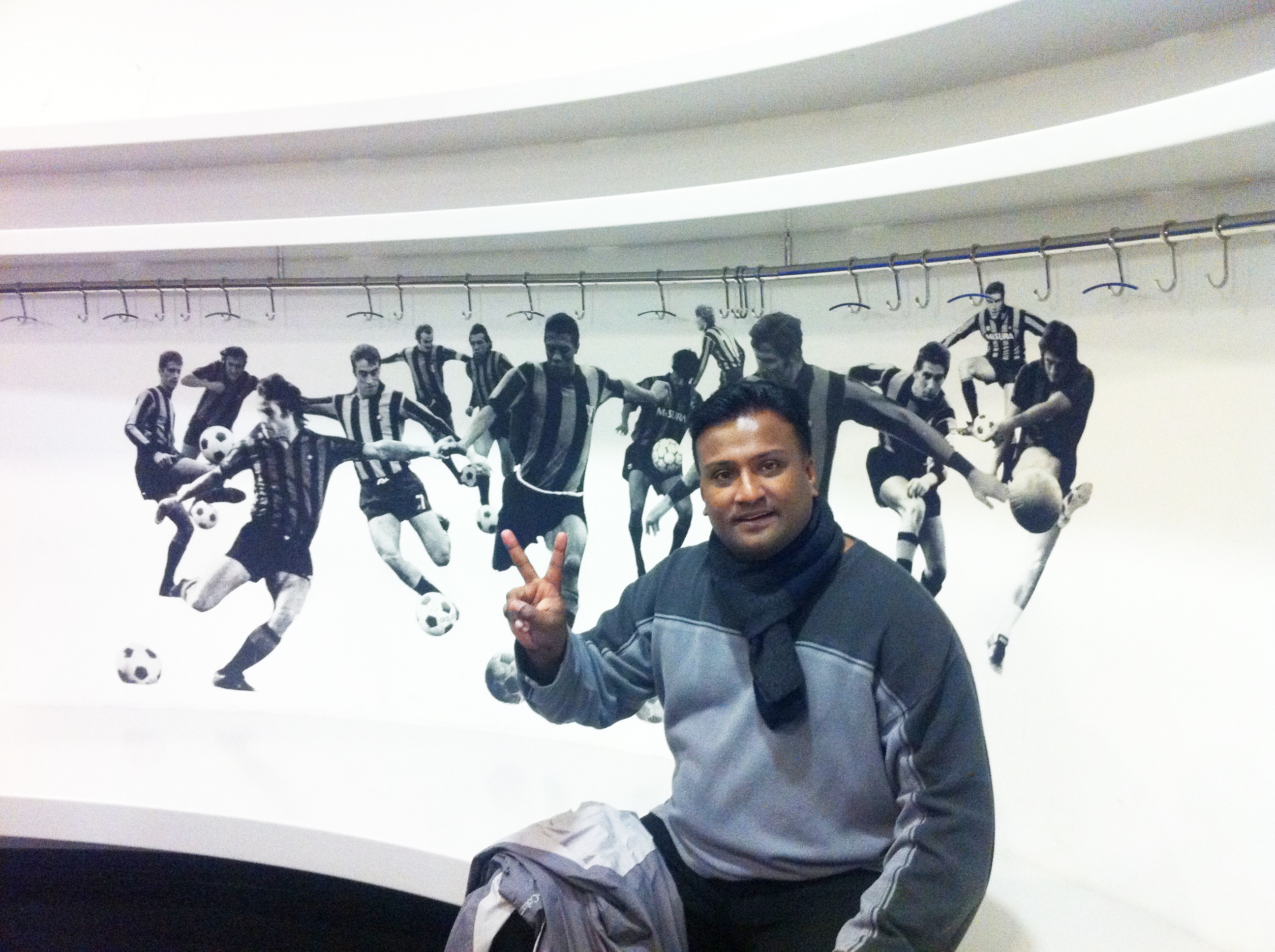 Inter Milan changing room